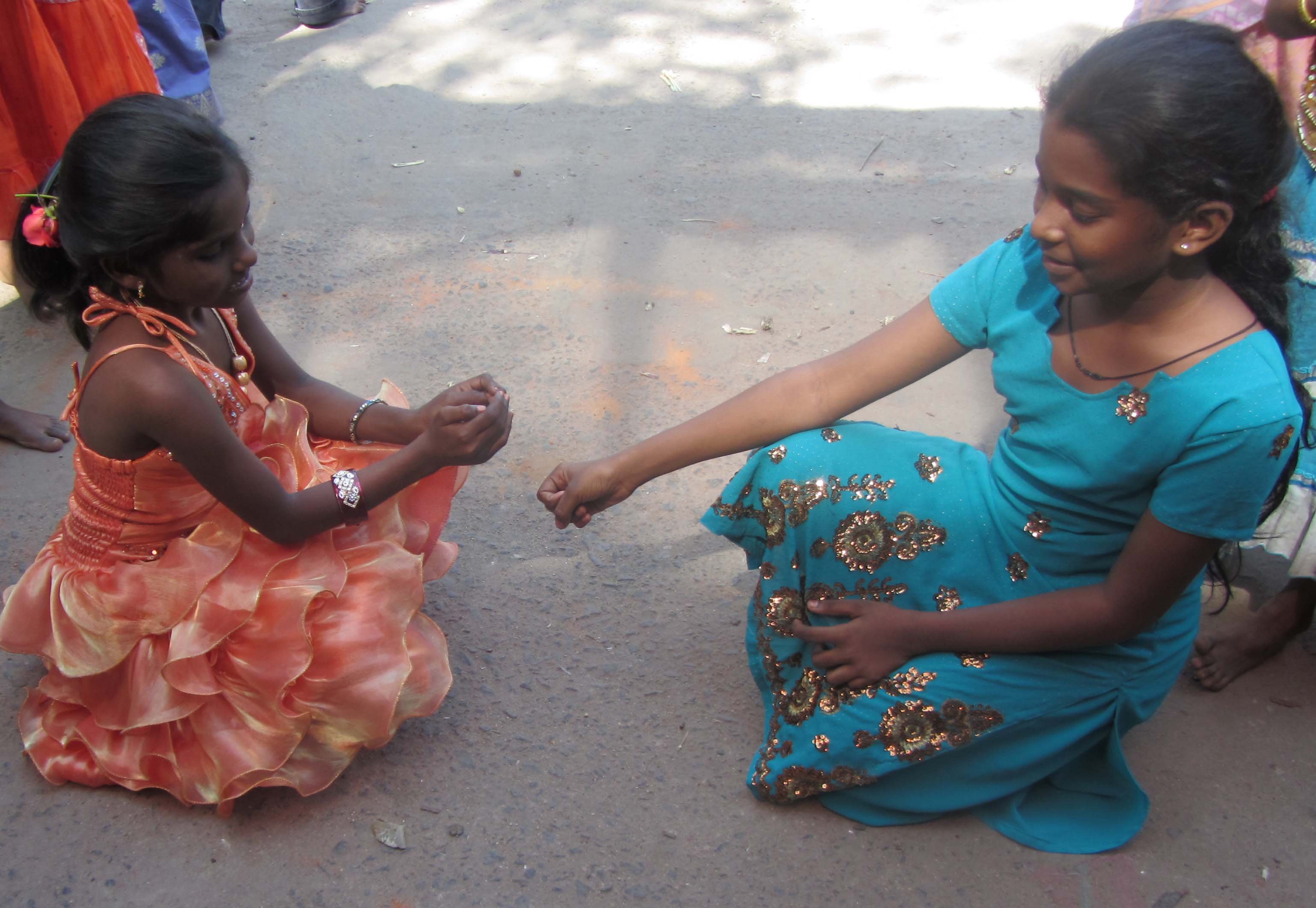 தமிழ்நாட்டில் குத்து-விளையாட்டு